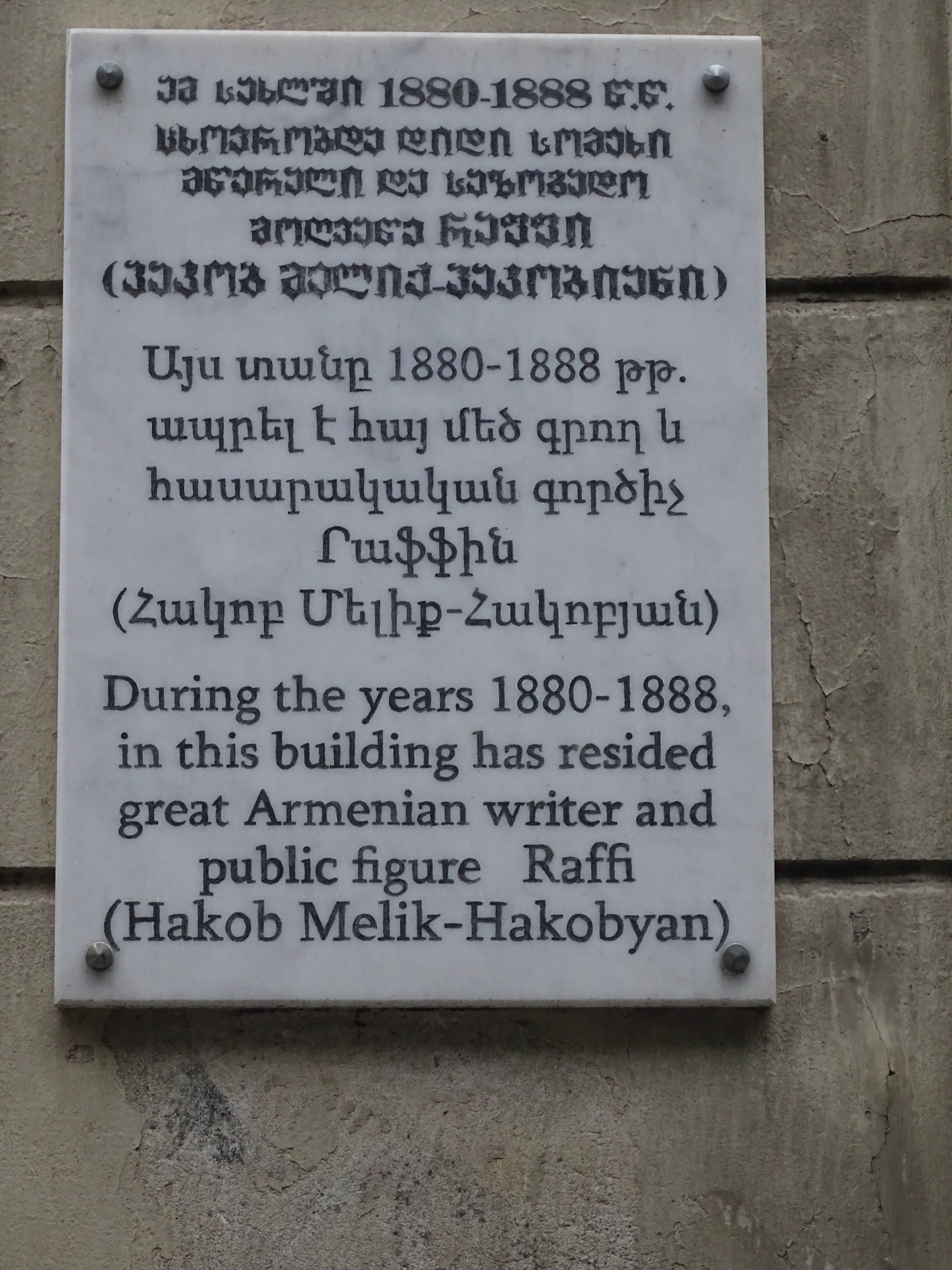 Gedenktafel für Raffi In Tiflis,Chonkadze Straße